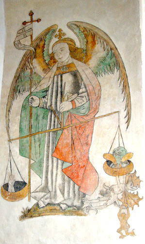 Kalkmaleri fra Århus Domkirke, Denmark